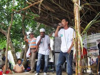 2009 presentación organizada por la fundación cultural TEFA (San Juan Nepomuceno, Bolívar) en el corregimiento San Jose del peñon, por motivo de la celebración de semana santa, el artista compartió tarima con su amigo "Edu"